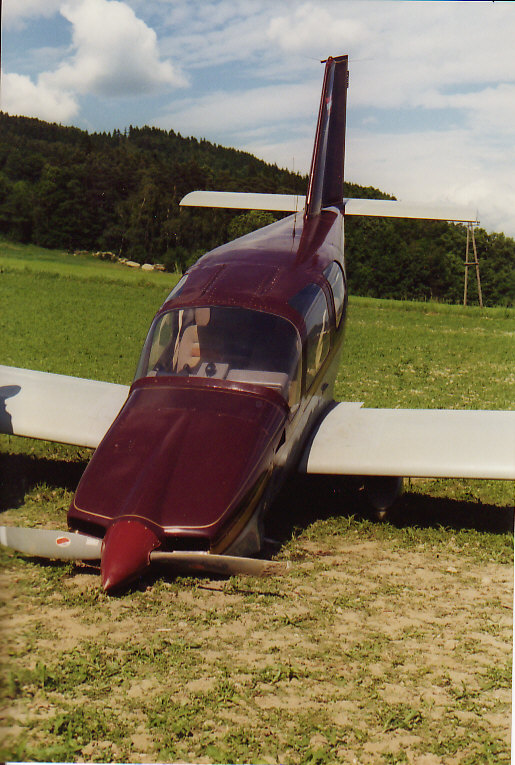 Ansicht von vorne der notgelandeten und beschädigten Socata TB9 mit dem Luftfahrzeugkennzeichen OE-DUZ